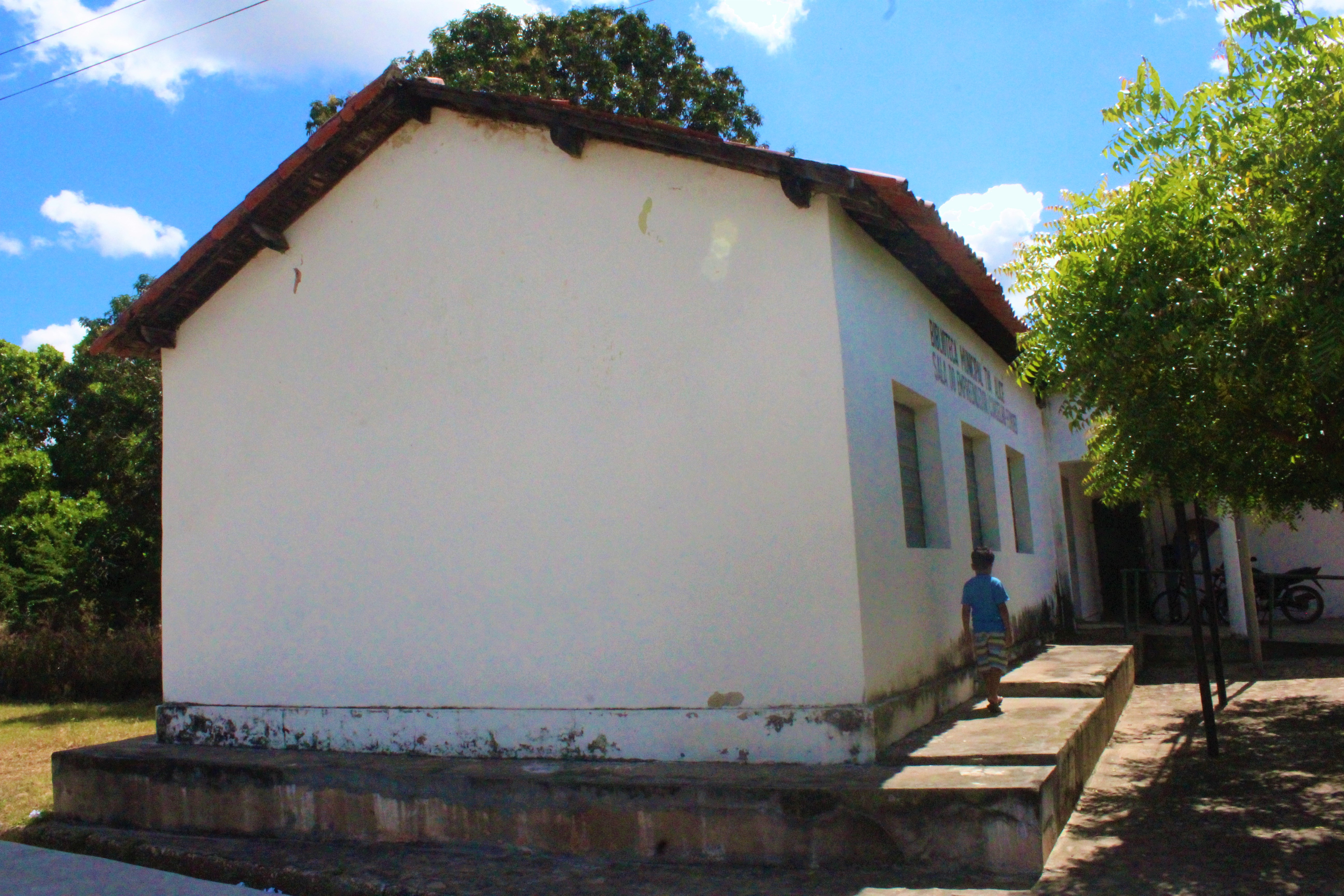 Vista da Biblioteca Municipal Prof Tia Alice em Coivaras, Piauí, Brasil.